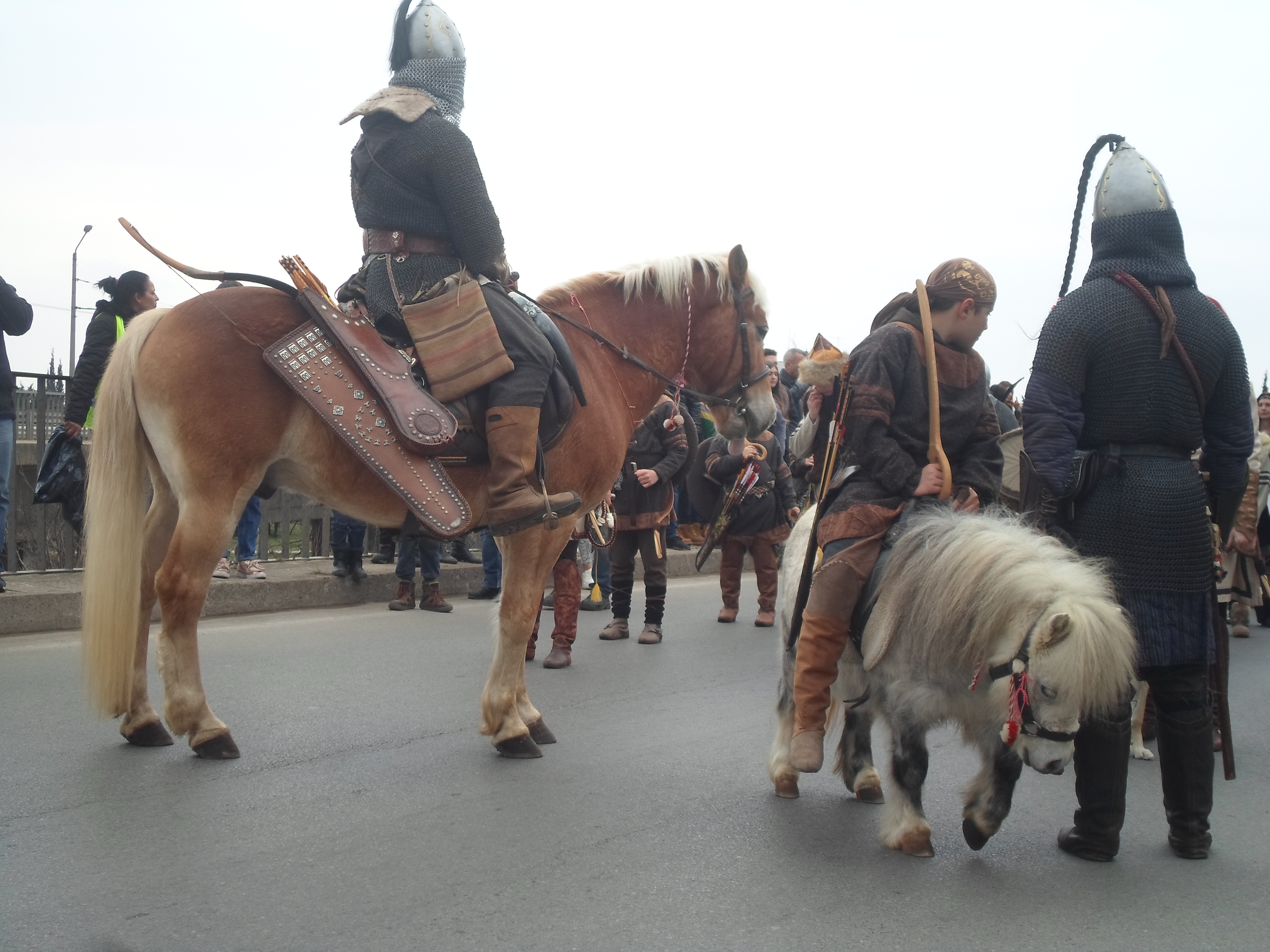 Конят Небесен и понито Рагнар от Прабългарска школа за оцеляване „Бага-Тур“ по време на празнично шествие, по повод 3-ти март, 2019 г.